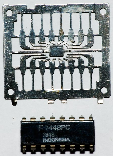 Polotovar pro zapouzdřování integrovaného obvodu a hotový obvod v plastovém pouzdru.